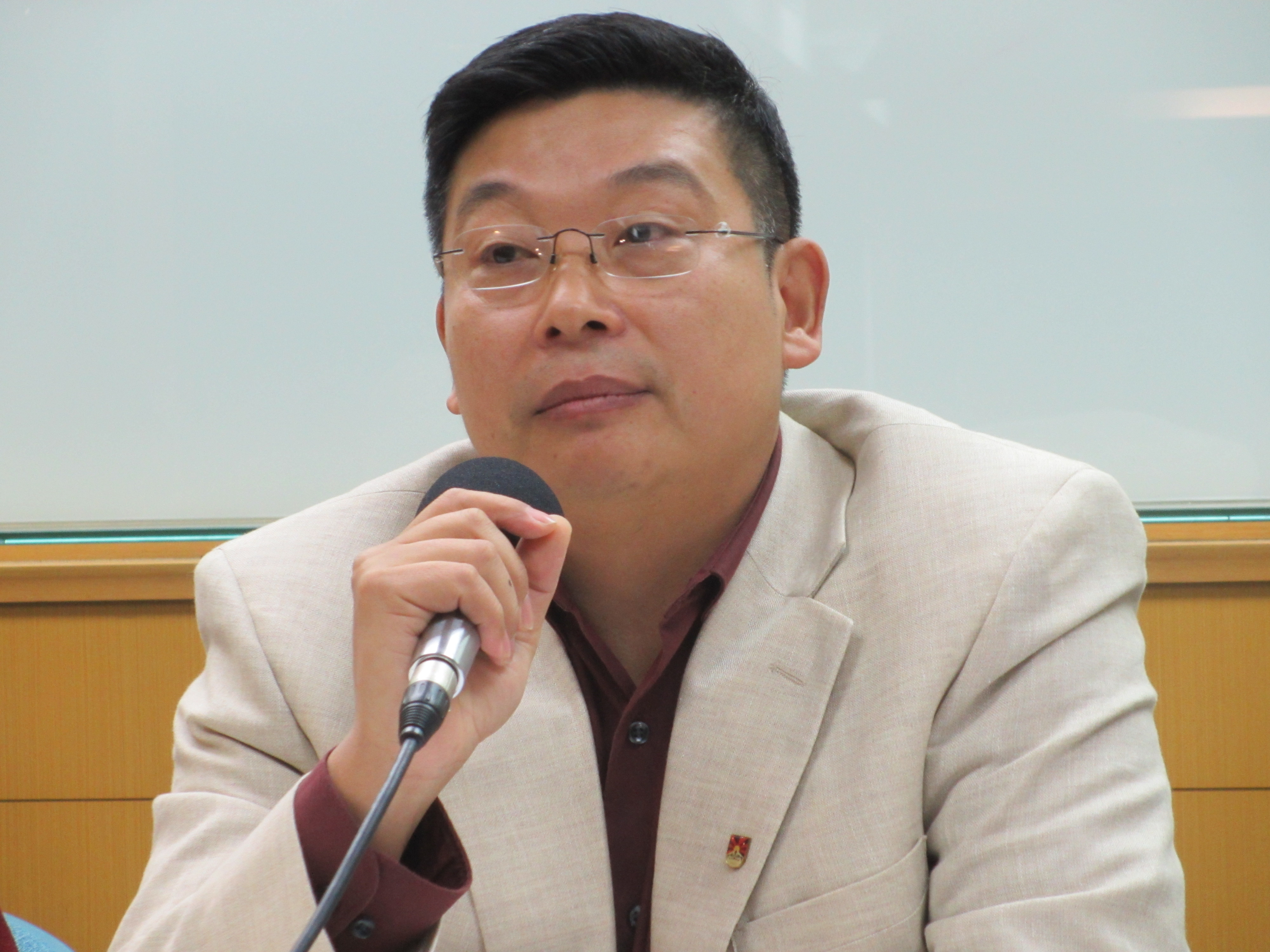 公民力量創辦人楊建利(美國之音張永泰拍攝)